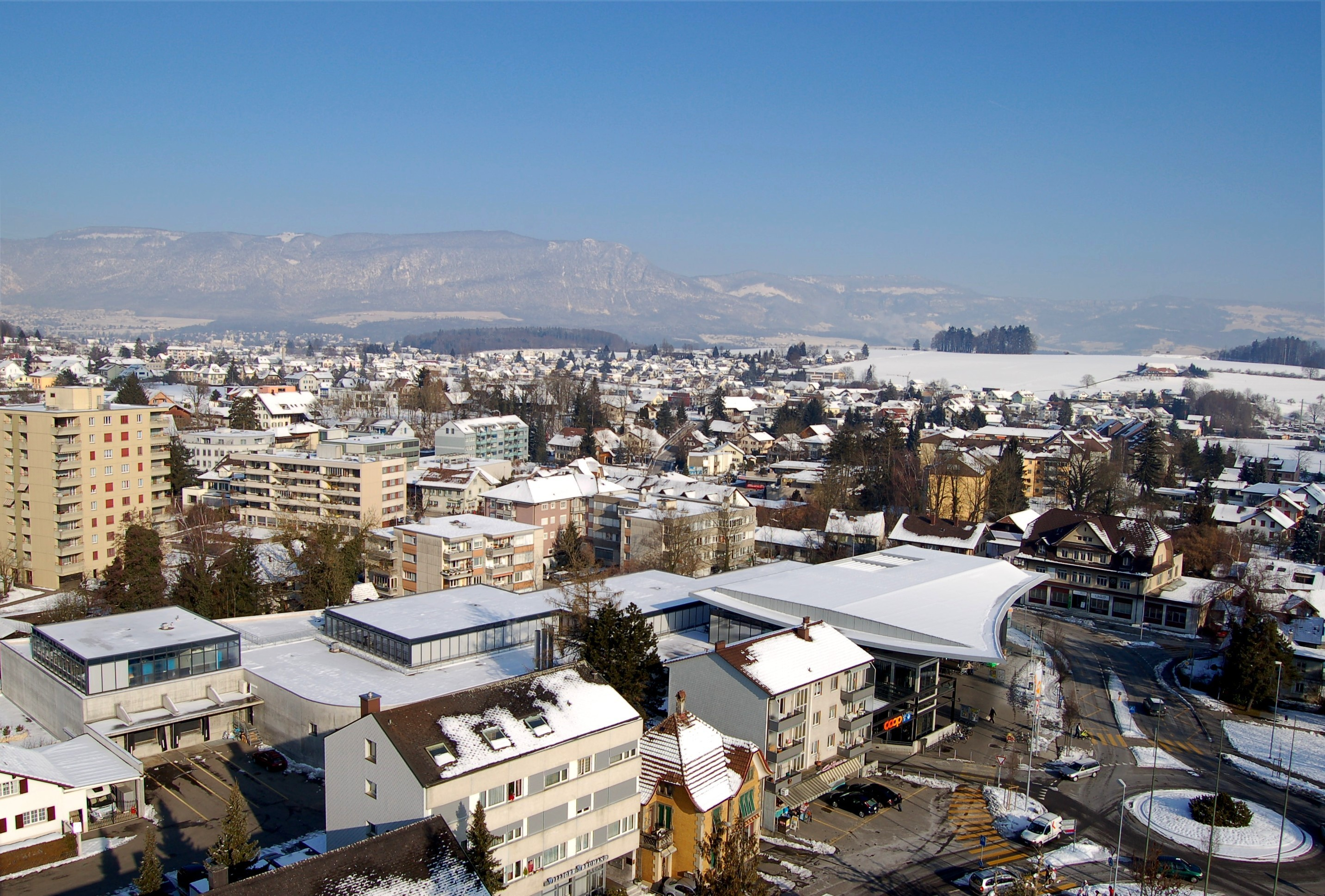 Biberist Richtung Jura vom Emmenpark aus aufgenommen